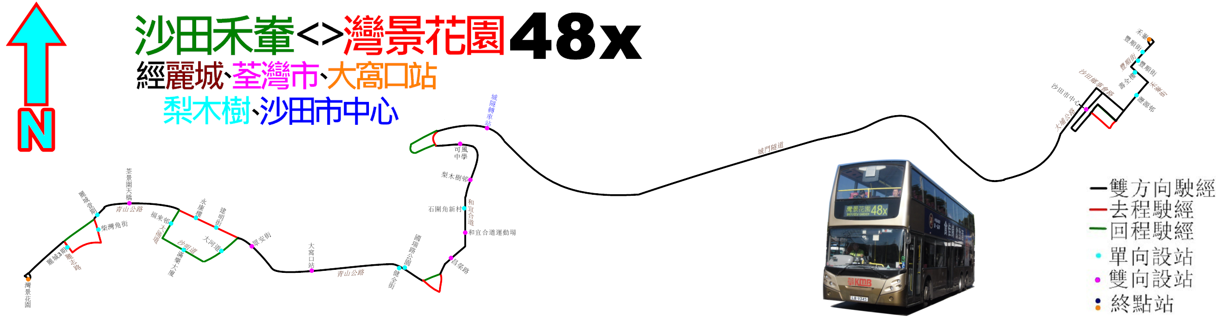 中文（香港）: 九巴48X線的走線圖